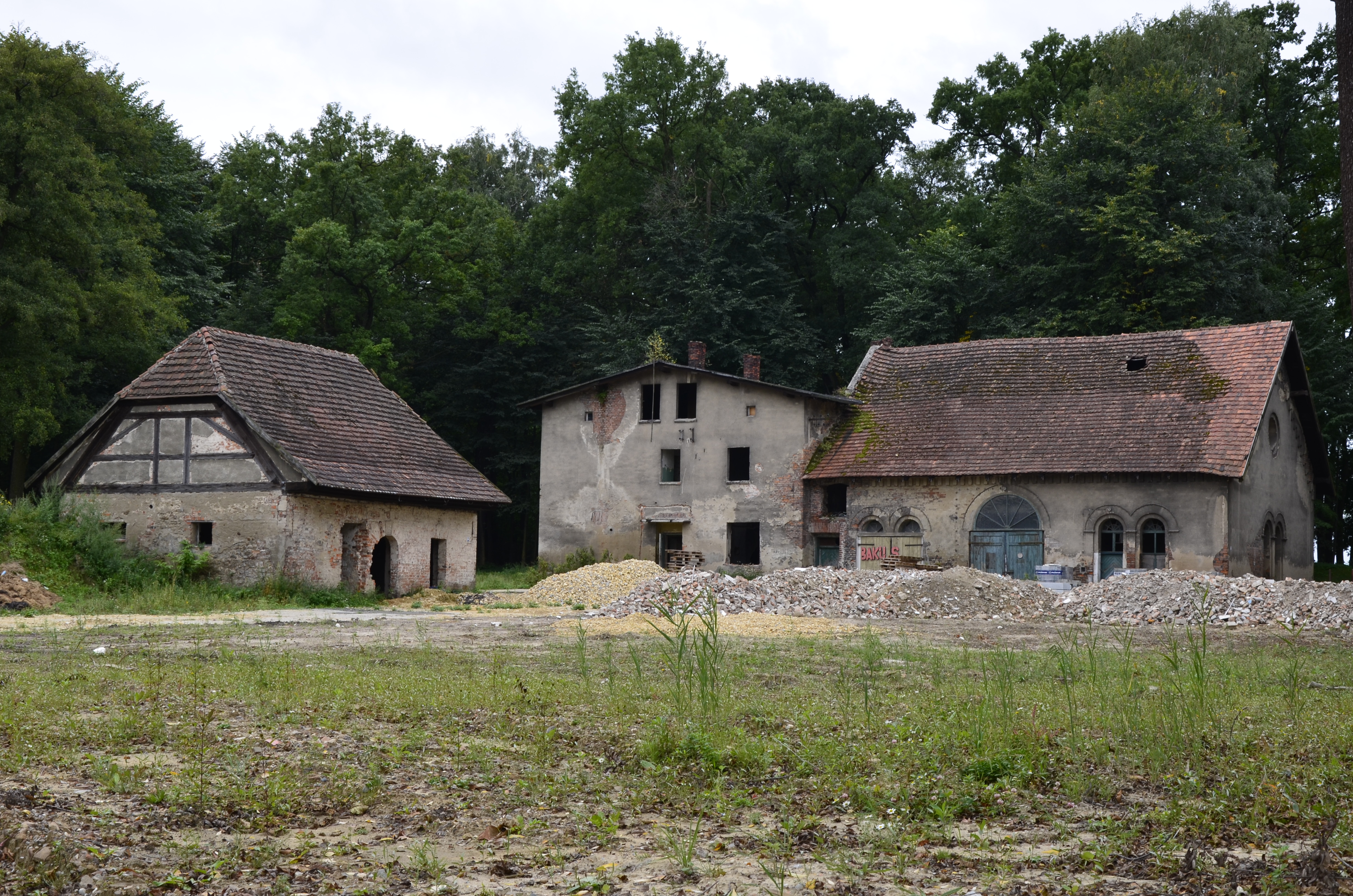 Zespół zabudowy Huty Paprockiej: budynek mieszkalno-administracyjny, budynek produkcyjny, budynek gospodarczy